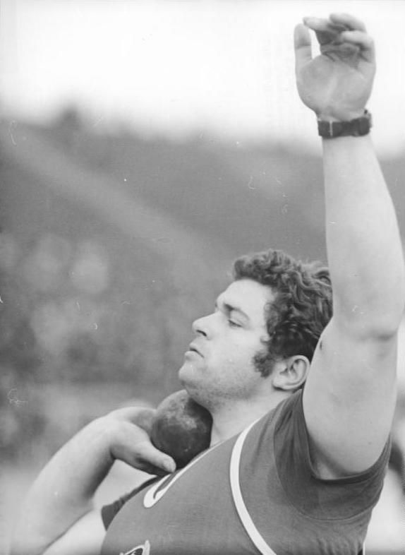 Heinz-Joachim Rothenburg ADN-ZB Kluge 28.08.1971 Berlin: Beim Leichtathletik-Länderkampf der Freundschaft -UdSSR-VR Polen-DDR am 28.08.1971 in Moskau stellte Heinz-Joachim Rothenburg (SC Dynamo Berlin) , hier bei einem früheren Wettkampf, im Kugelstoßen mit 21,12 m einen neuen Europarekord auf.